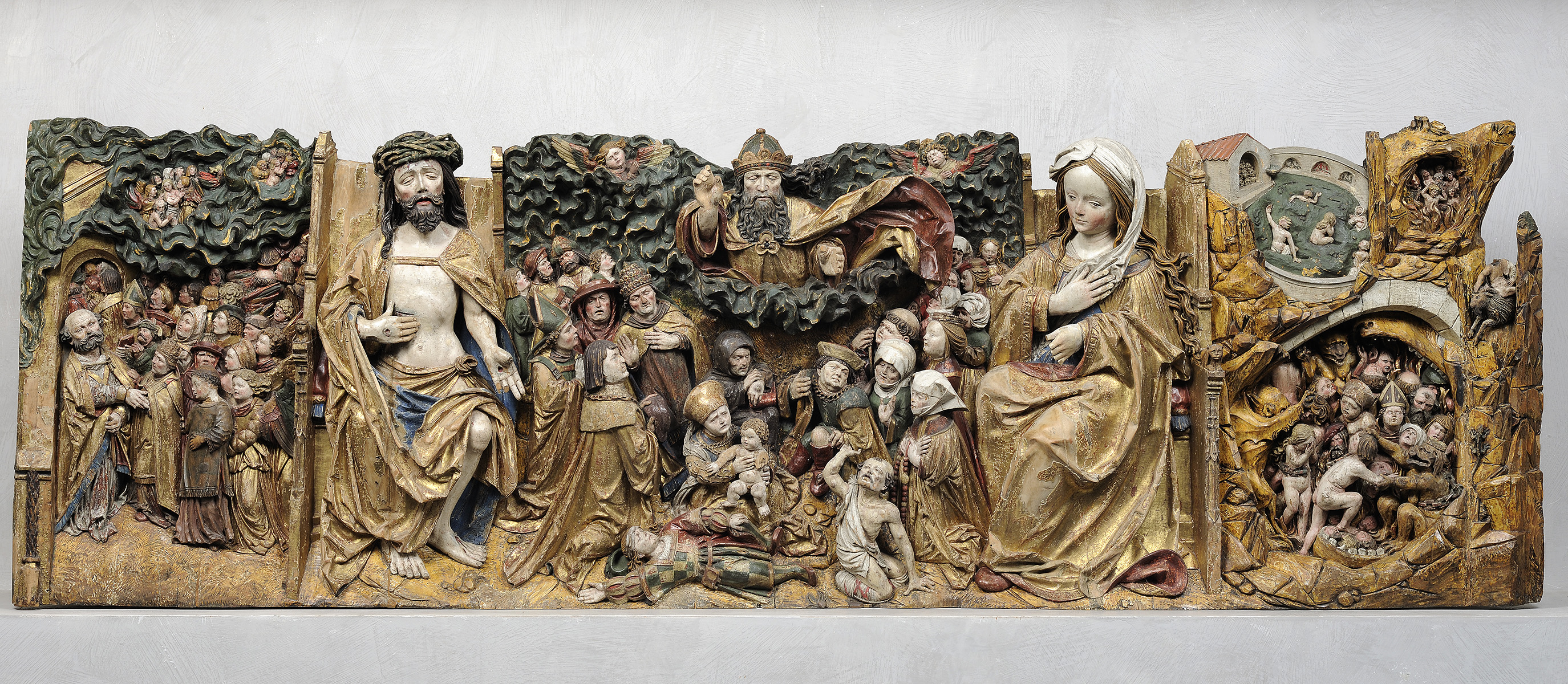 sculpture réalisée vers 1520 à Biberach en Souabe. le Christ de douleur et la Vierge trônant intercèdent auprès de Dieu le Père, émergeant des nuées entouré de deux anges, en faveur de l’humanité et de pestiférés. À leurs pieds sont figurés plusieurs personnages déjà touchés par le mal, qui frappe toutes les catégories sociales : une mère et son enfant, un mendiant infirme ou un riche bourgeois. De part et d’autre de ces malades apparaissent un homme et une femme agenouillés, sans doute les donateurs. L’ensemble est complété par des représentations du Paradis d’un côté, de l’Enfer et, peut-être, du Purgatoire de l’autre.